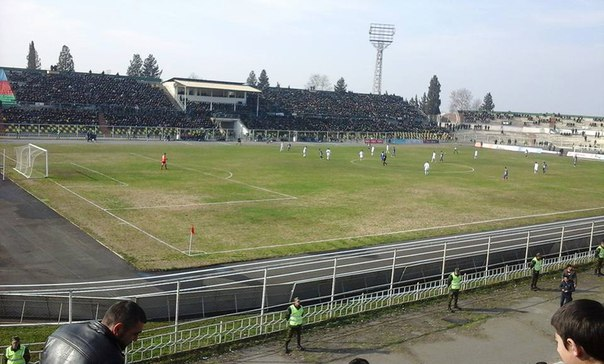 матчи